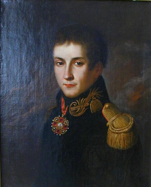 Портрет графа Александра Алексеевича Мусина-Пушкина